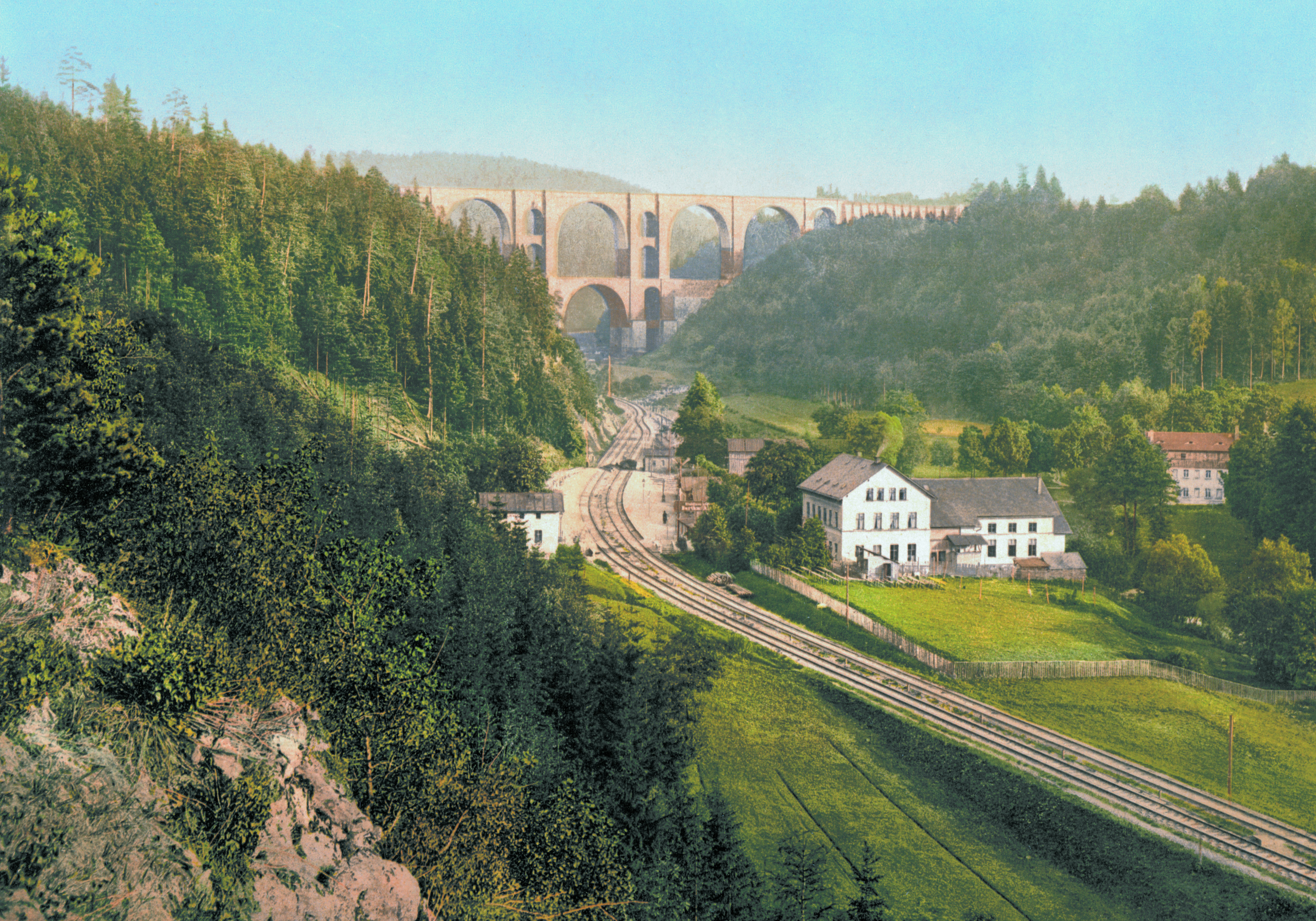 Die Elstertalbrücke bei Jocketa überspannt die Weiße Elster